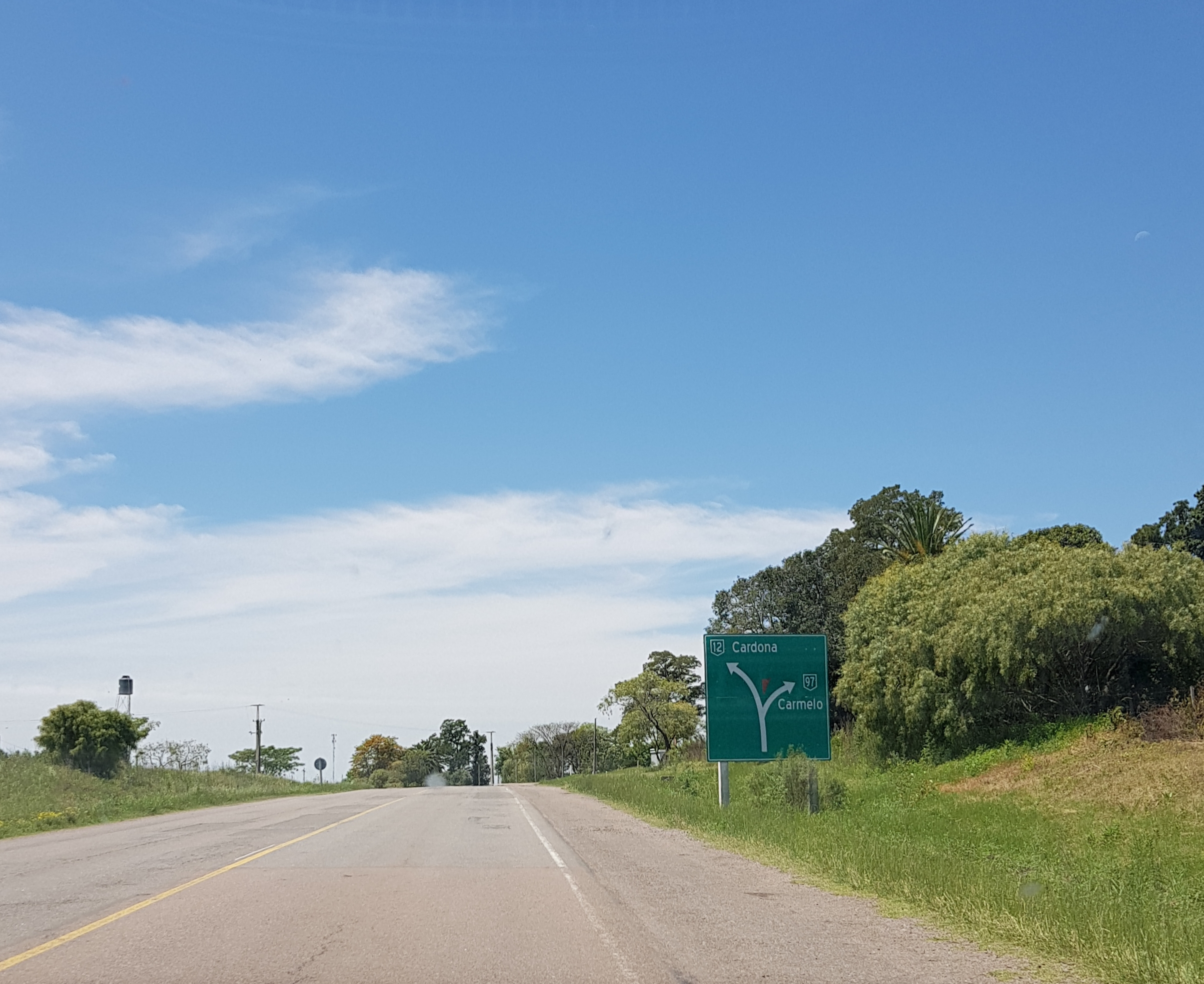 Empaleme Rutas 12 y 97